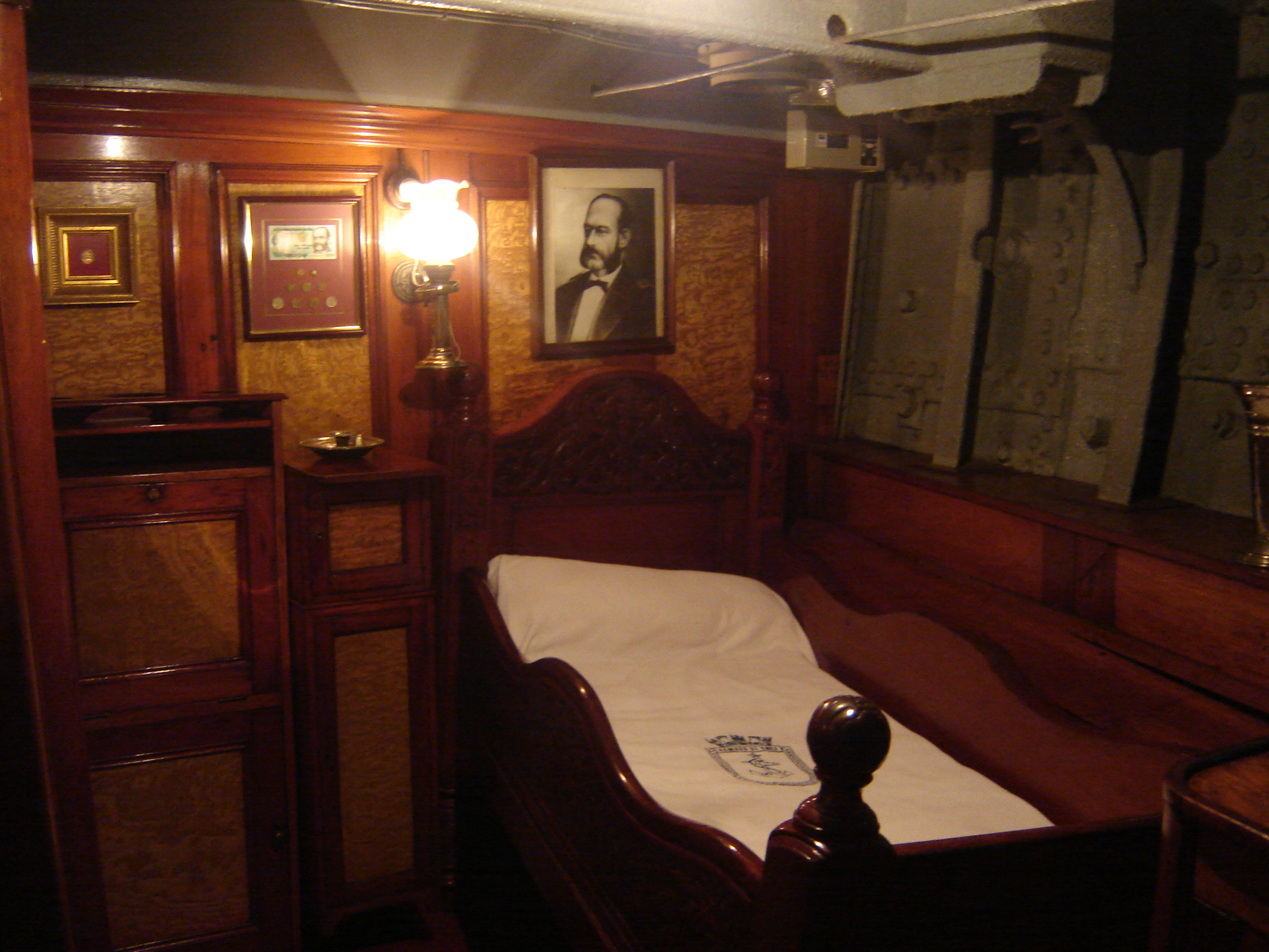 Foto obtenida por el Usuario Valo, el día 27 de julio de 2005 en Talcahuano, Chile. Los demás datos se revelan abajo.